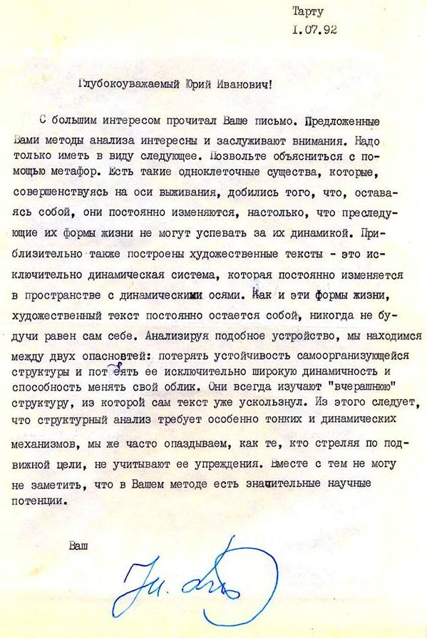 Лист Ю. Лотмана професору Ю. І. Ковбасенку